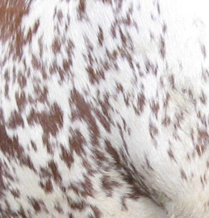 Klassische Tigerung bei einem Ansbach-Triesdorfer Rind (Triesdorfer Tiger)